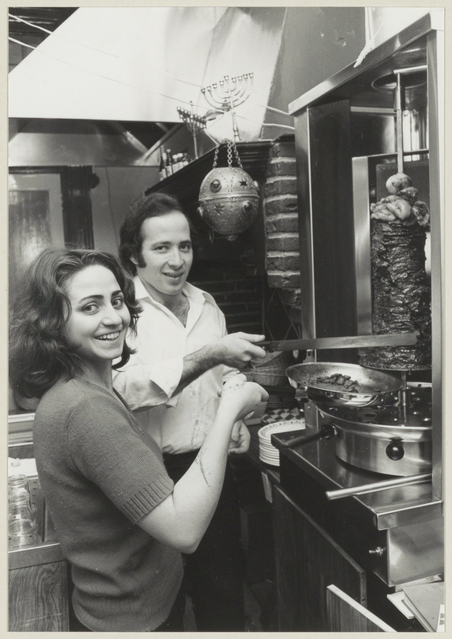 CollectieCollectie Fotoburo de BoerInventarisnummerNL-HlmNHA_54004887BeschrijvingDe keuken van restaurant "King David",Paarlaarsteeg 10, waar Israëlisch voedsel wordt bereid.FotonummerNL-HlmNHA_1478_2198DocumenttypePortrettenVervaardigerBoer, Cees de (1918-1985) Soort vervaardigerFotograaf Interieur/ExterieurinterieurLandNederland ProvincieNoord-Holland GemeenteHaarlem PlaatsHaarlem StraatPaarlaarsteeg GeografischCentrum Begindatum1976Einddatum1976TechniekFoto Trefwoordenhoreca